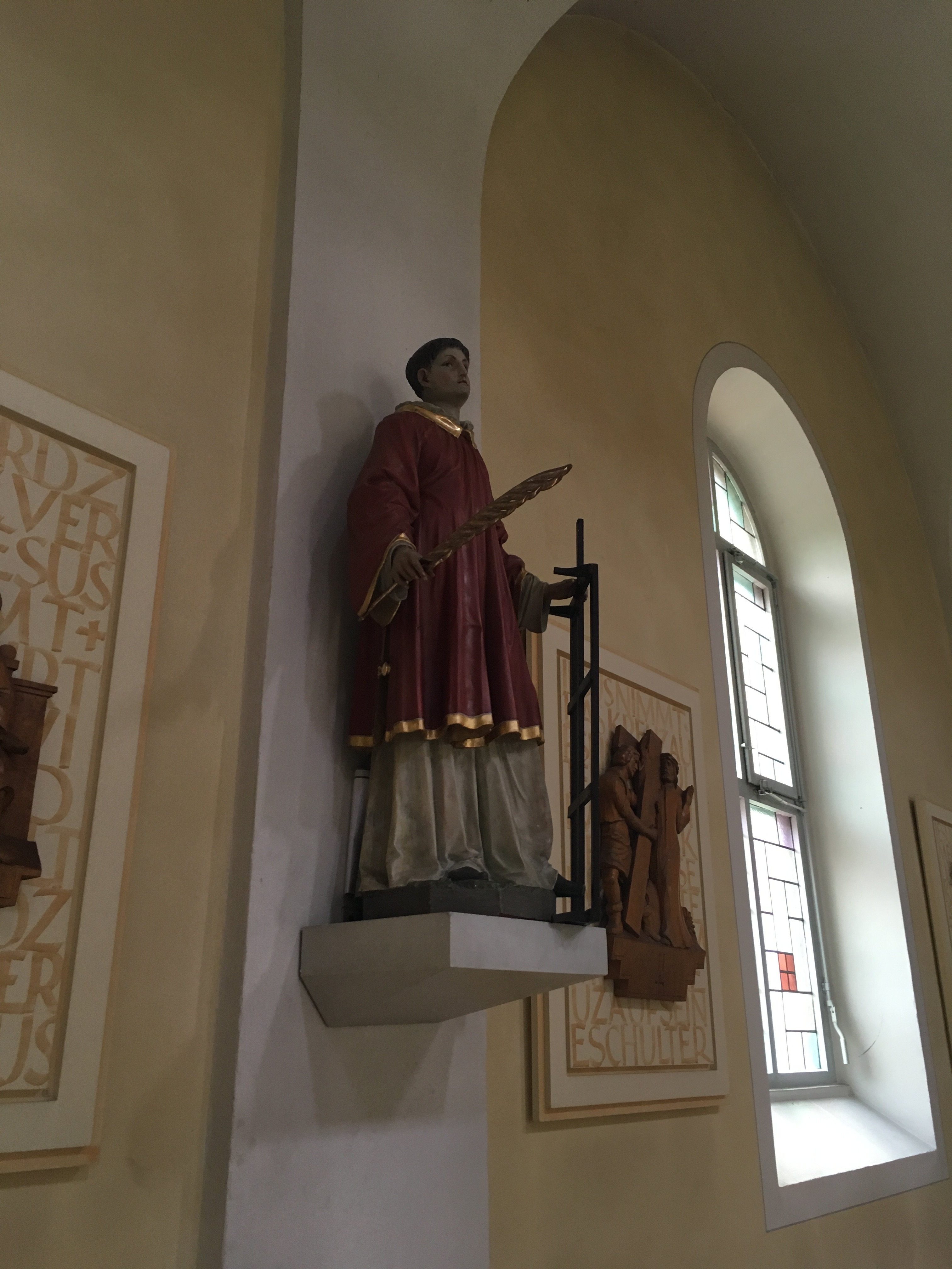 St. Laurentius ist die Pfarrkirche der Gemeinde Hügelsheim im Landkreis Raststatt in Baden-Württemberg. Die neuromanische, dreischiffige Basilika entstand in den Jahren 1842 bis 1843.